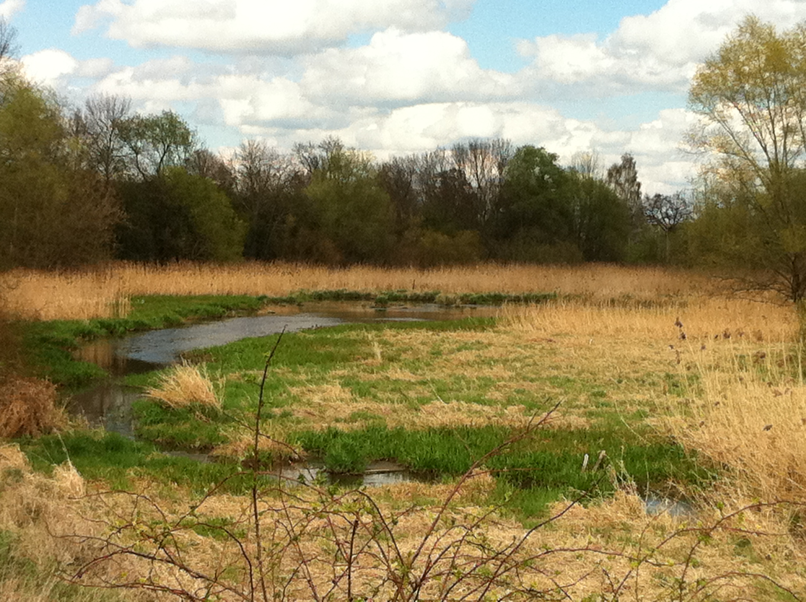 Altarm der Saale bei Halle (nordwestlich Trotha). Die Götsche mündet in diesen Altarm und mündet nach Durchfliessen in die Saale.